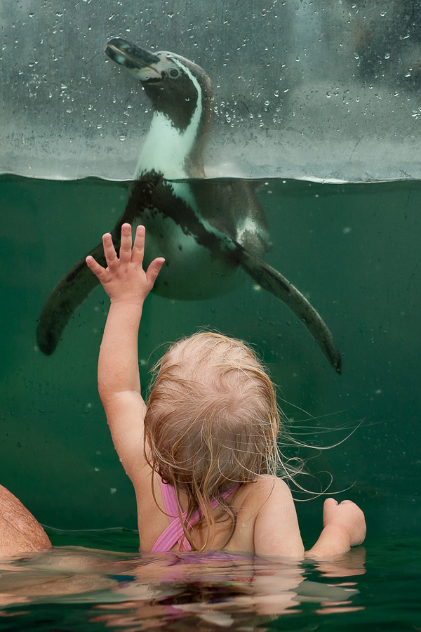 Schwimmen mit Pinguinen - eine europaweit einzigartige Attraktion